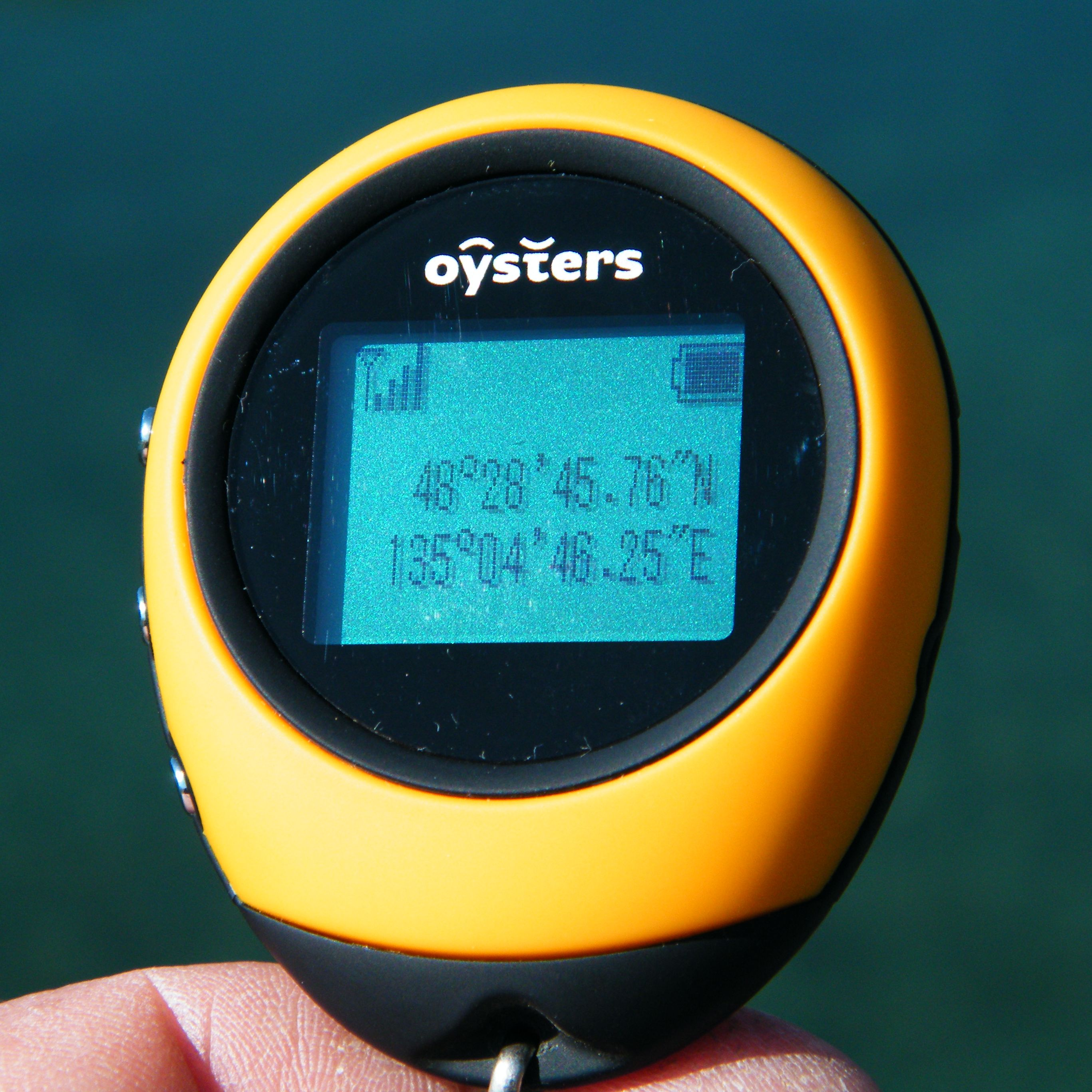 GPS-навигатор Oysters